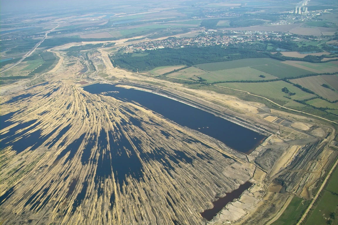 Der stillgelegte Tagebau Zwenkau vor der Flutung, oben die Stadt Zwenkau. Im Tagebaubereich lagen früher die Dörfer Eythra und Bösdorf